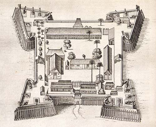 Fort Nassau at Bandanaira, Banda Islands